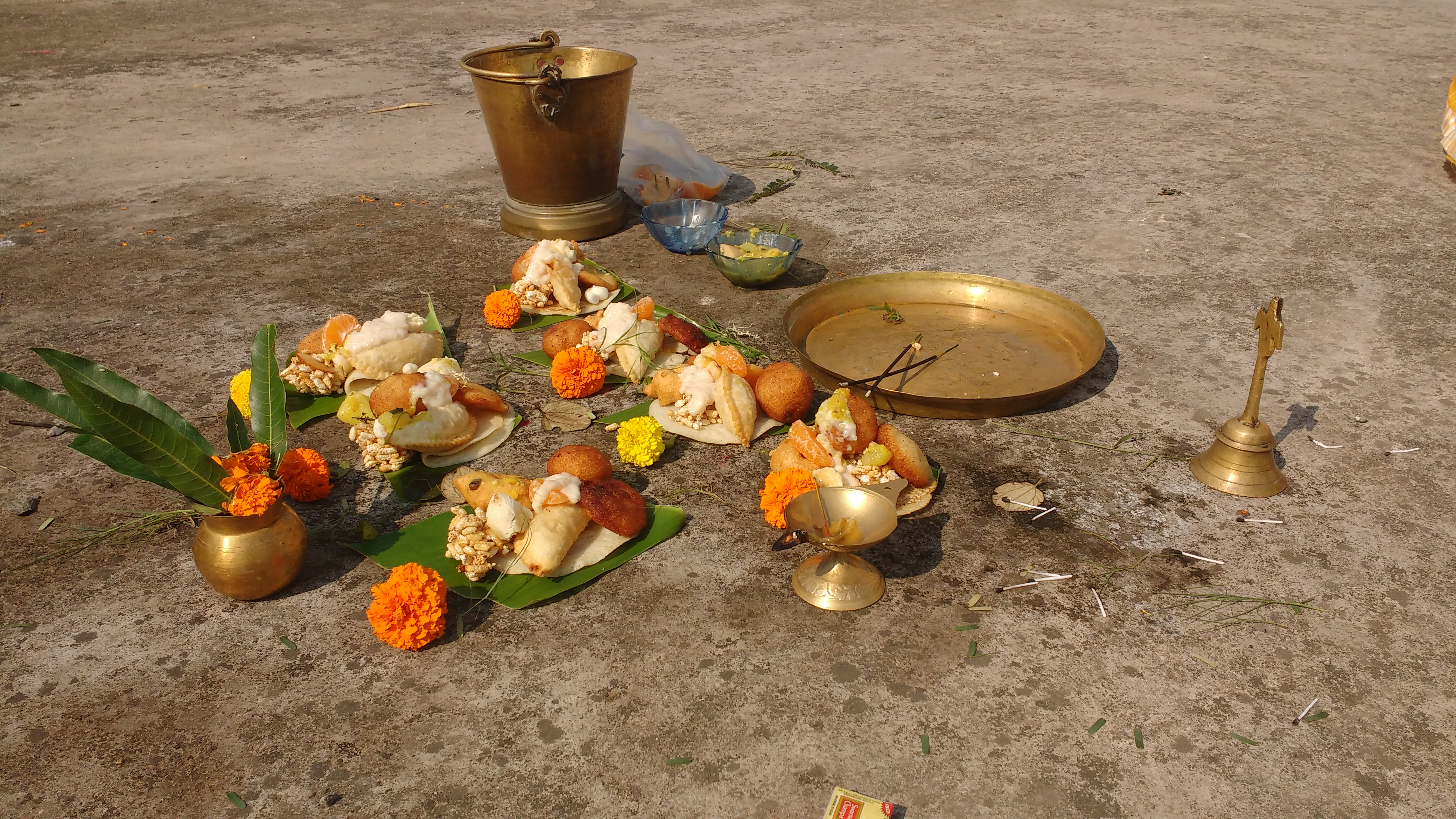 ଶାମ୍ବ ଦଶମୀ